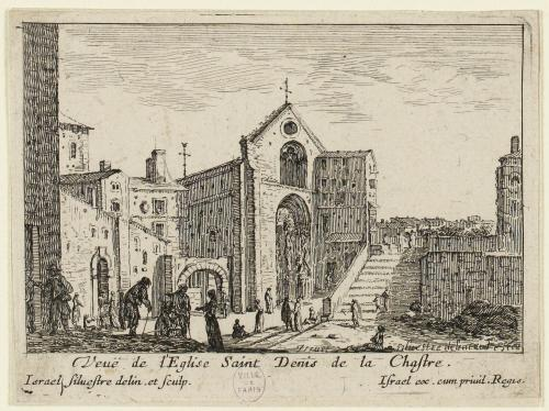 St-Denis de la Châtre vers 1650